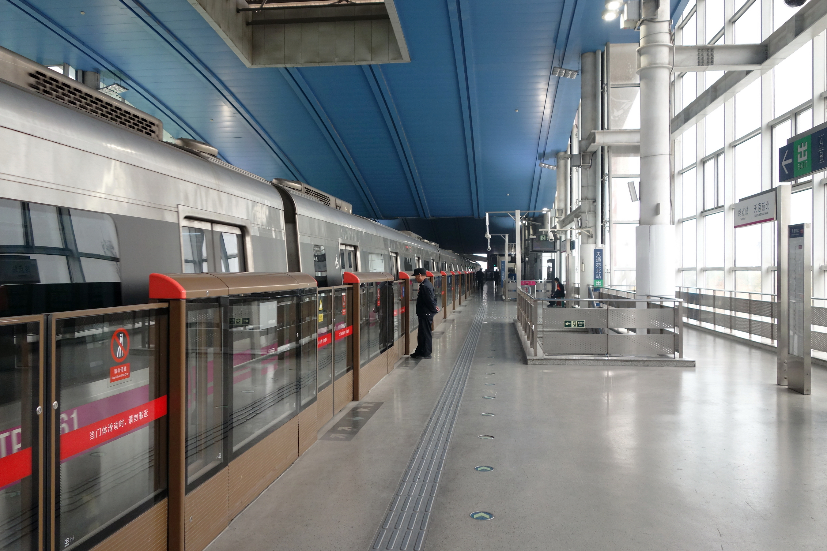 北京地铁5号线北端终点站天通苑北站侧式站台